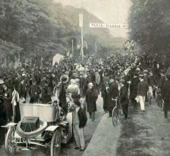 Le départ de Paris-Madrid 1903 à Versailles (à partir de 4 heures du matin), La Vie au Grand Air du 29 mai 1903, p. 343